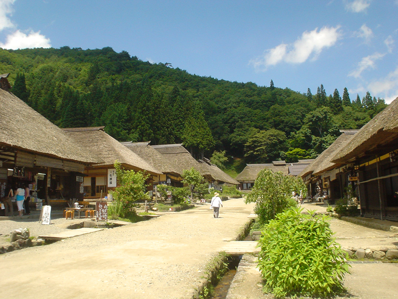 福島県南会津郡下郷町の大内宿の写真。写真撮影：Fluffy_nns 撮影年月日：2006年7月26日 著作権：放棄します